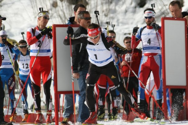 See Title